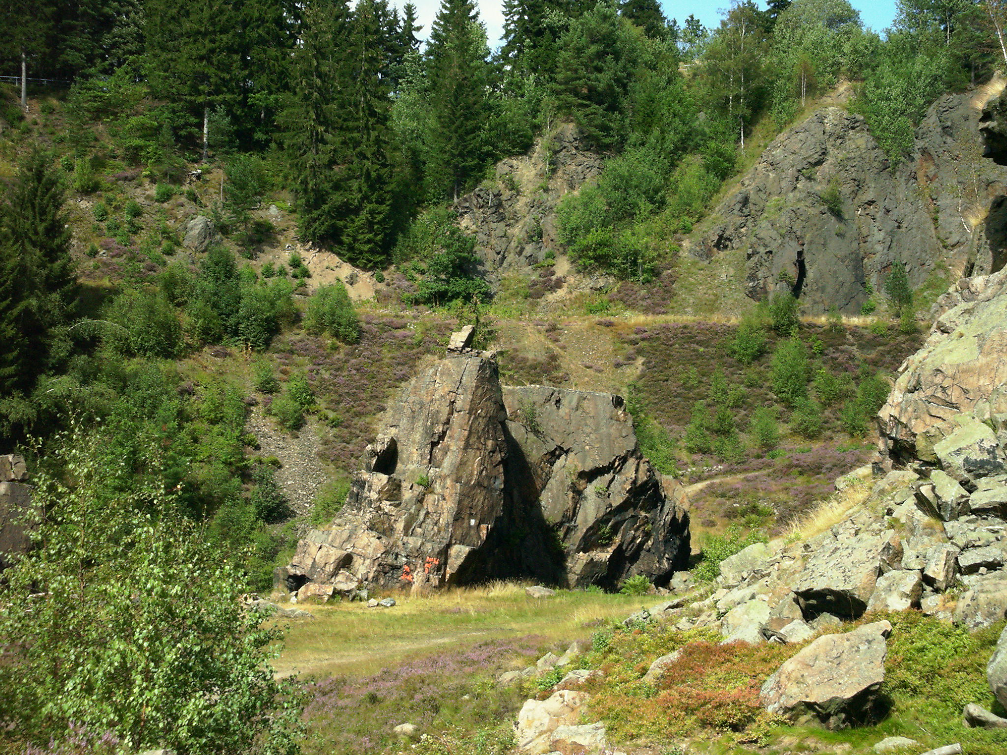 Binge in Geyer (Erzgeb.)